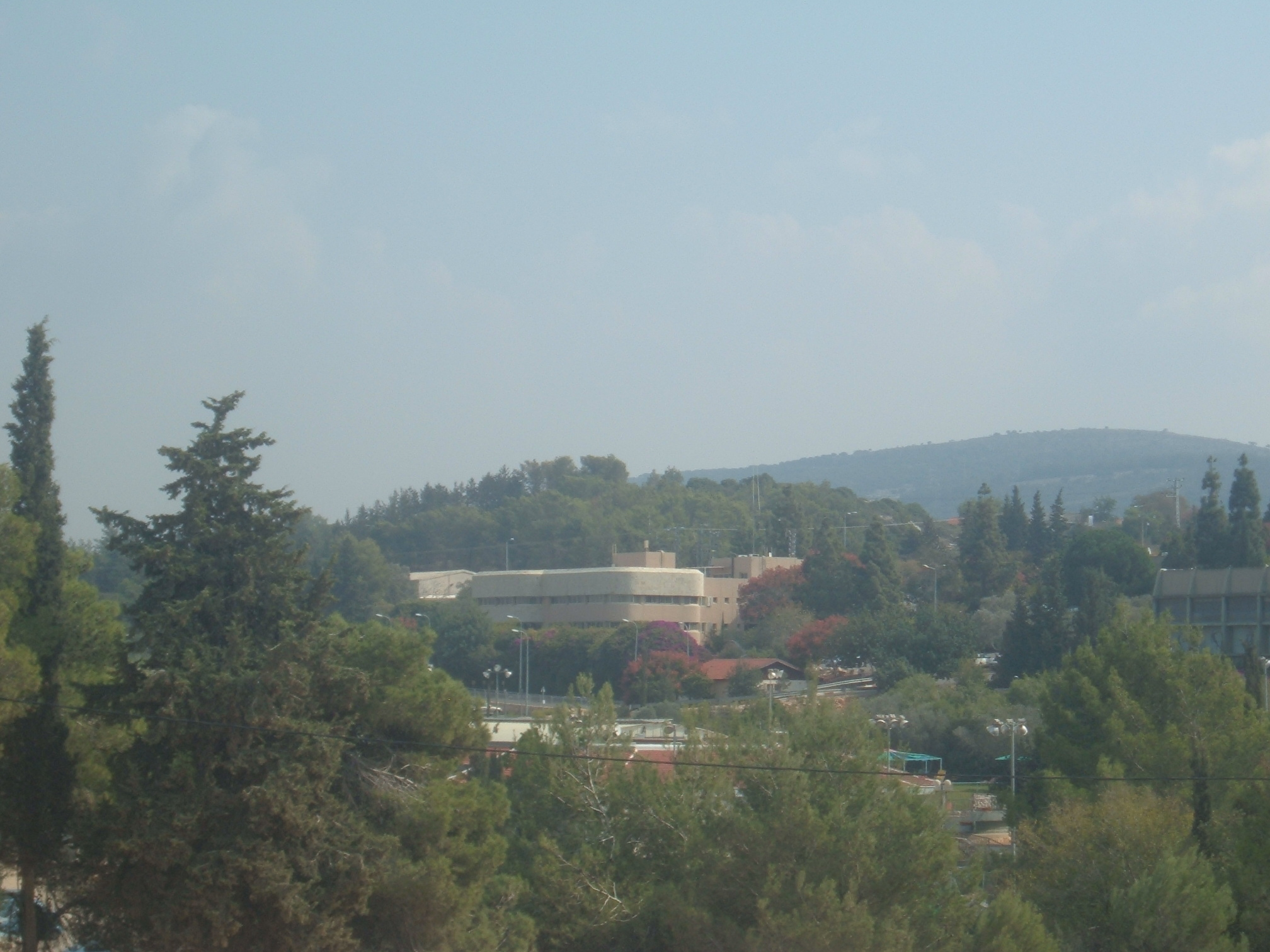 regional council misgav, Israel; בניין המועצה האזורית משגב